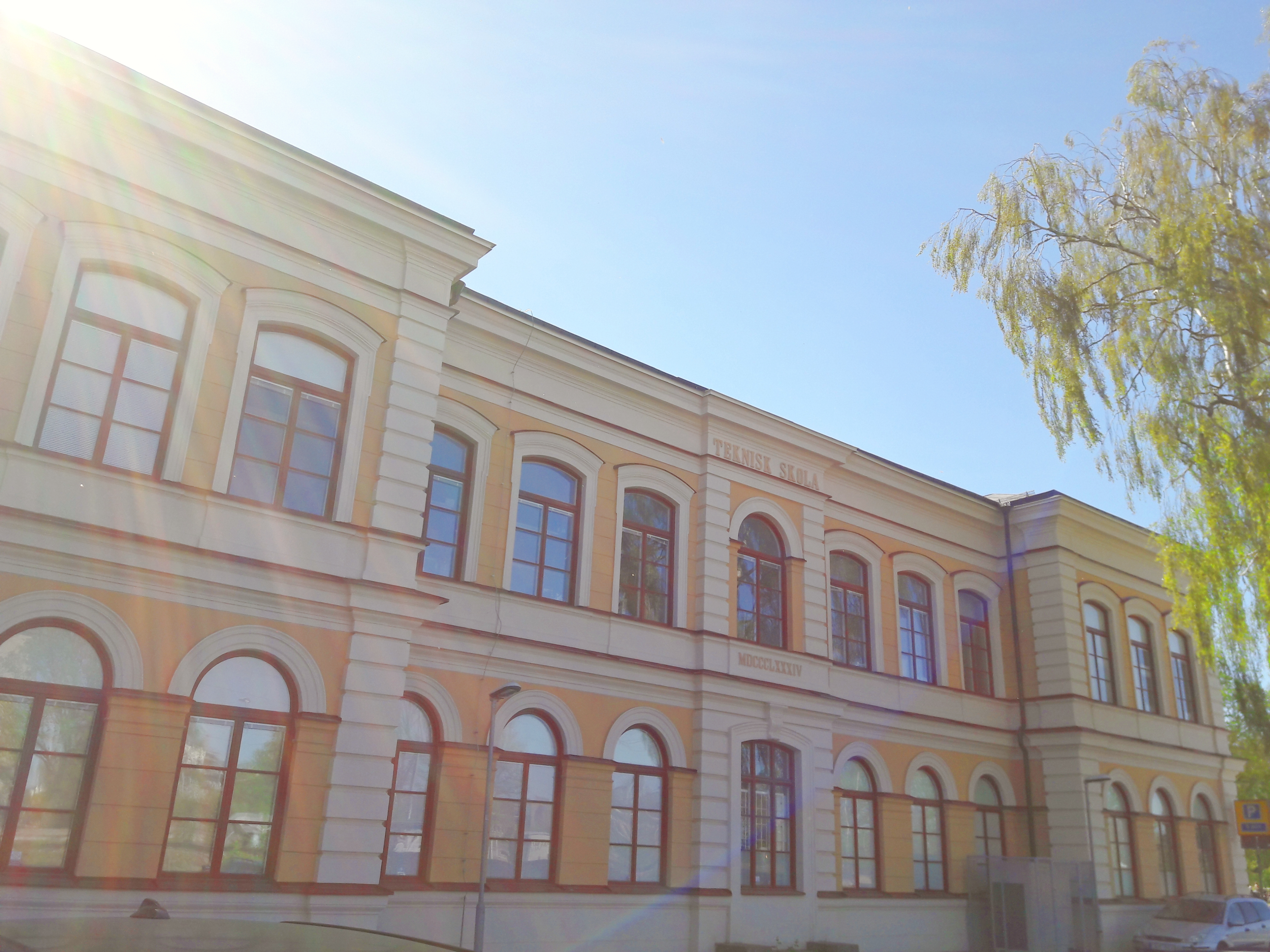 Uppsala Estetiska Gymnasium maj 2018.